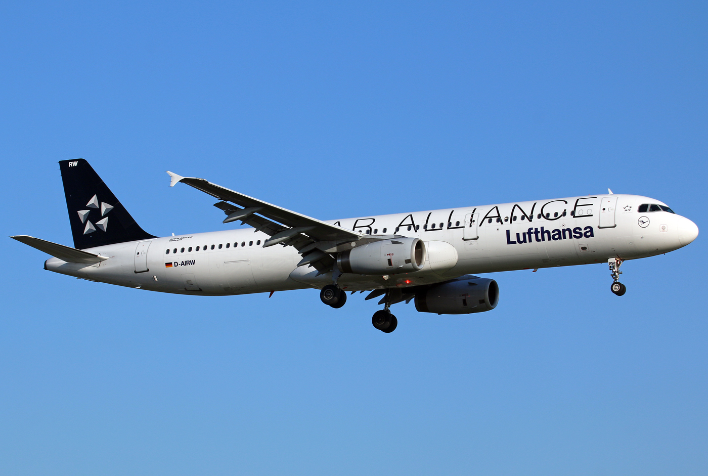 Hamburg 15 April 2015